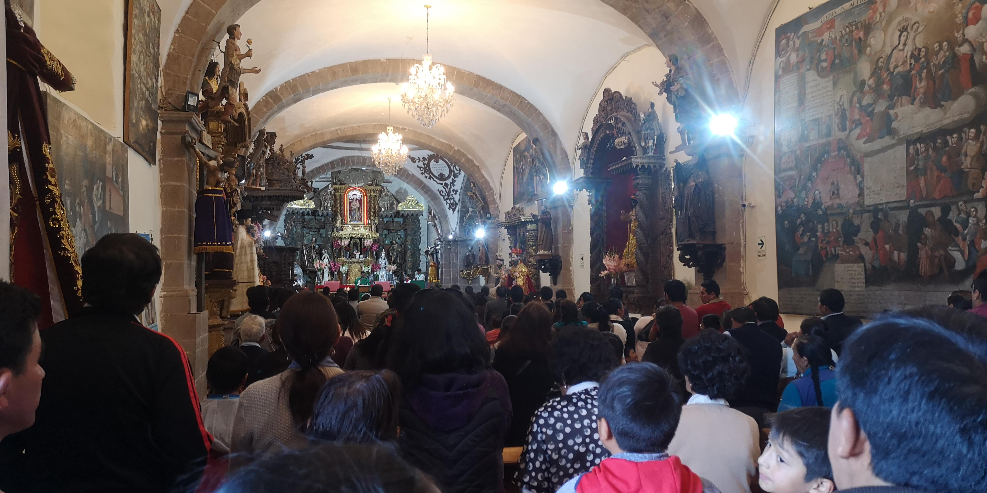 Vista del interior del templo de la Almudena.